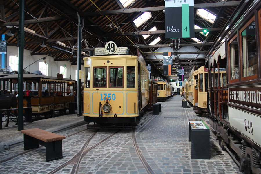 Photo prise au Musée le 03.05.2014.